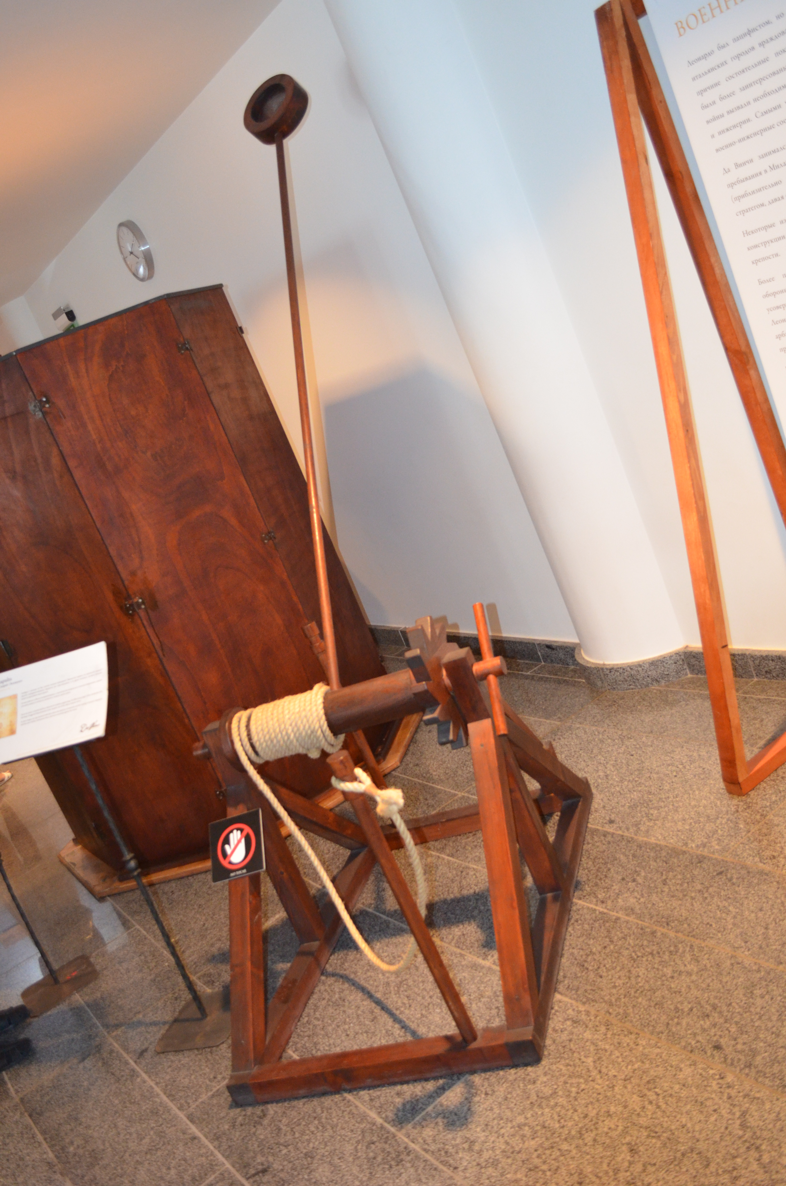 Виставка «Геній да Вінчі» (Київ)